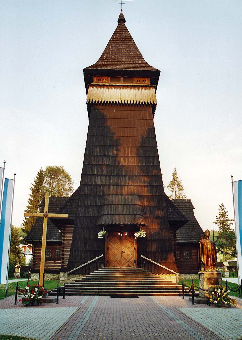 Kościół św. Jacka w Groniu, stan na sierpień 2006. Czas powstania: 1952–1958, autor projektu: Tadeusz Brzoza.